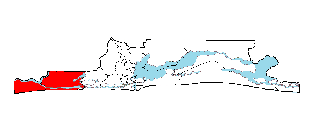 Ubicación de Badagry en el Estado de Lagos